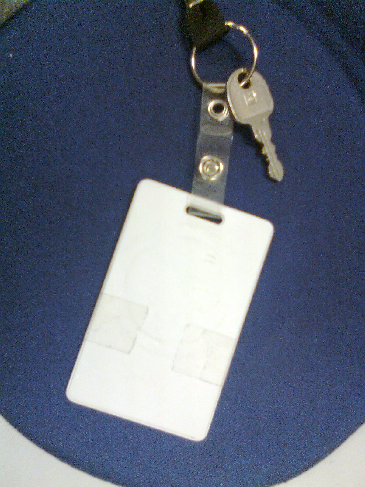 इलेक्ट्रॉनिक किल्ली